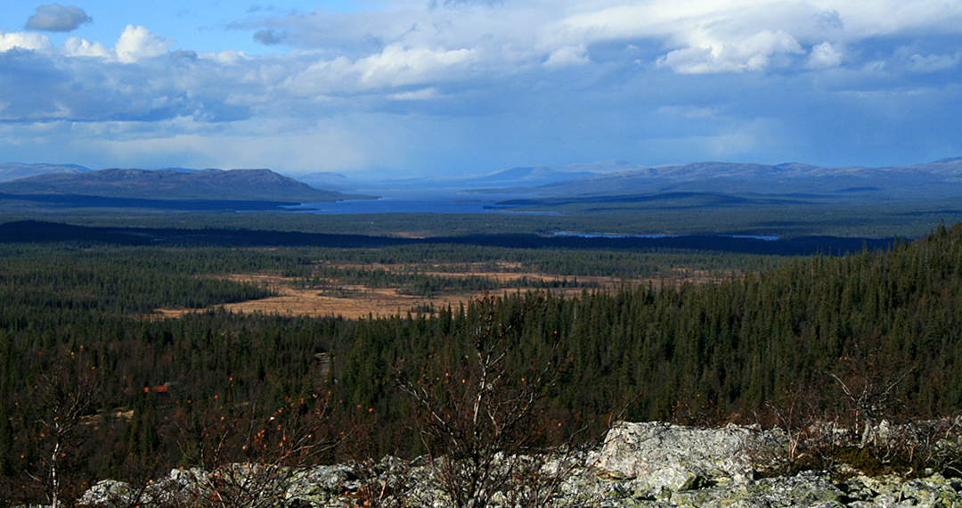 Femunden sett fra Engerdal Østfjell